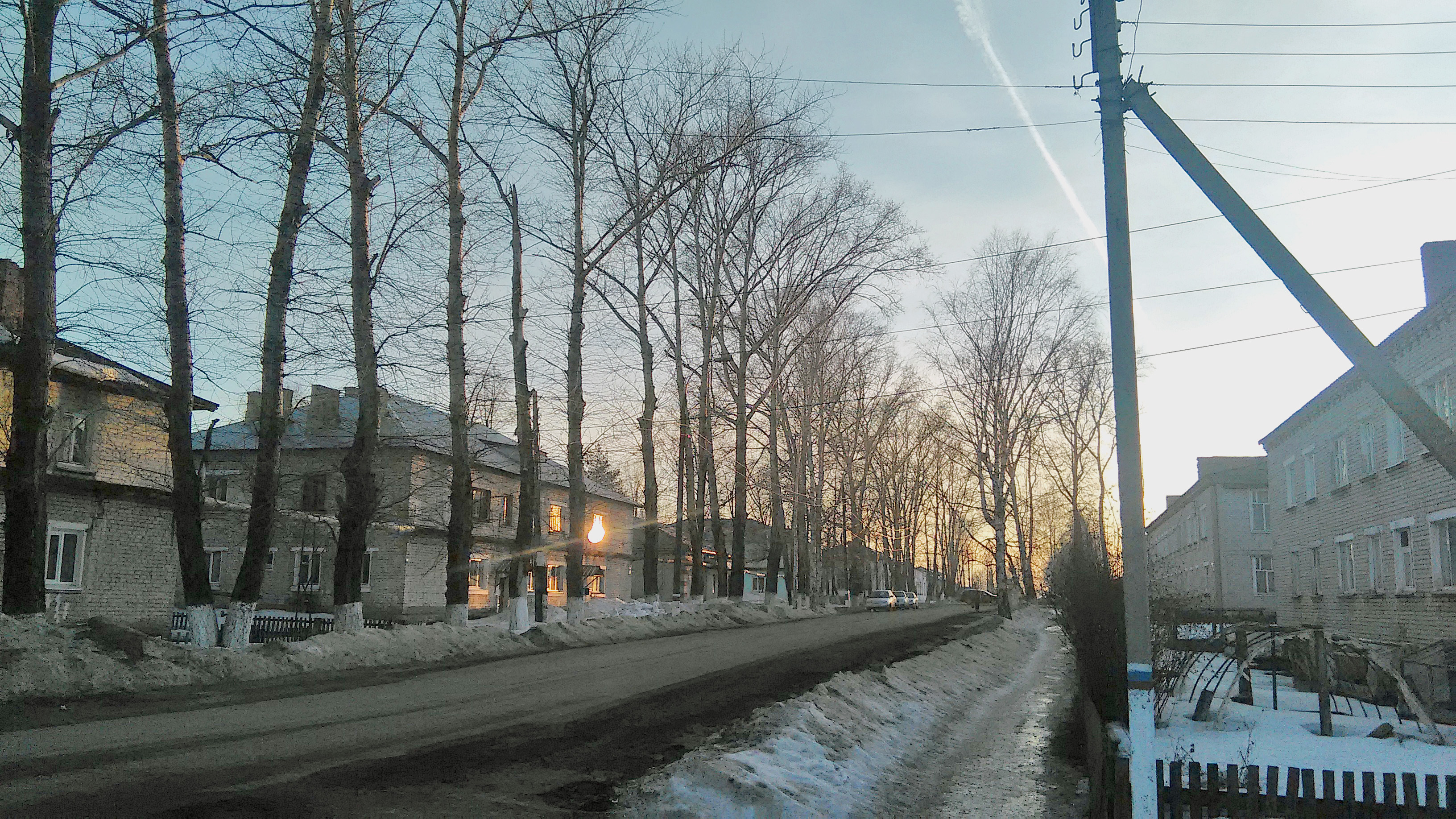 Вид на ул. Революционной на Нижний — Шахунья